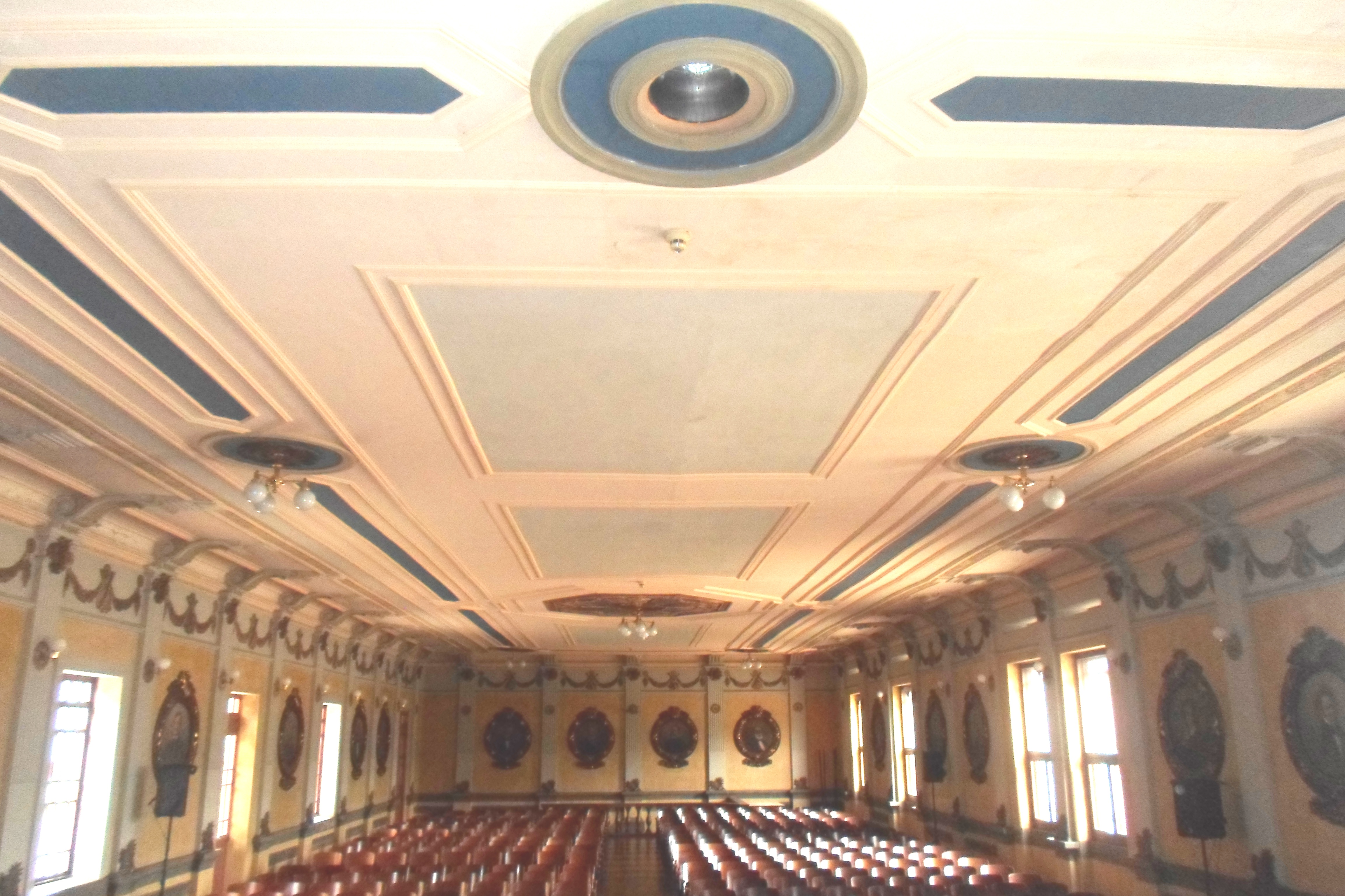 Con una arquitectura Neoclásica Francesa que resalta las decoraciones en yeso y los apliques que dan realce a las tonalidades, el salón musical Alberto Castilla es uno de los más importantes de Colombia y reconocido en el mundo por grandes artistas.Su construcción hecha con materiales especiales para dar buena acústica la hacen una de las más buscadas para los conciertos.Con un espacio para 400 espectadores, el gran salón guarda la forma y características desde su construcción entre los años 1932 y 1934. En 16.6 metros de ancho y 37,34 de fondo (desde el trascenio hasta la escalera de la entrada principal) se pueden observar el estilo republicano y los detalles que propusieron en su época el arquitecto Helí Moreno Otero, el escultor Félix María Otalora, el pintor Domingo Moreno Otero y el ingeniero Alfonso Pulecio.